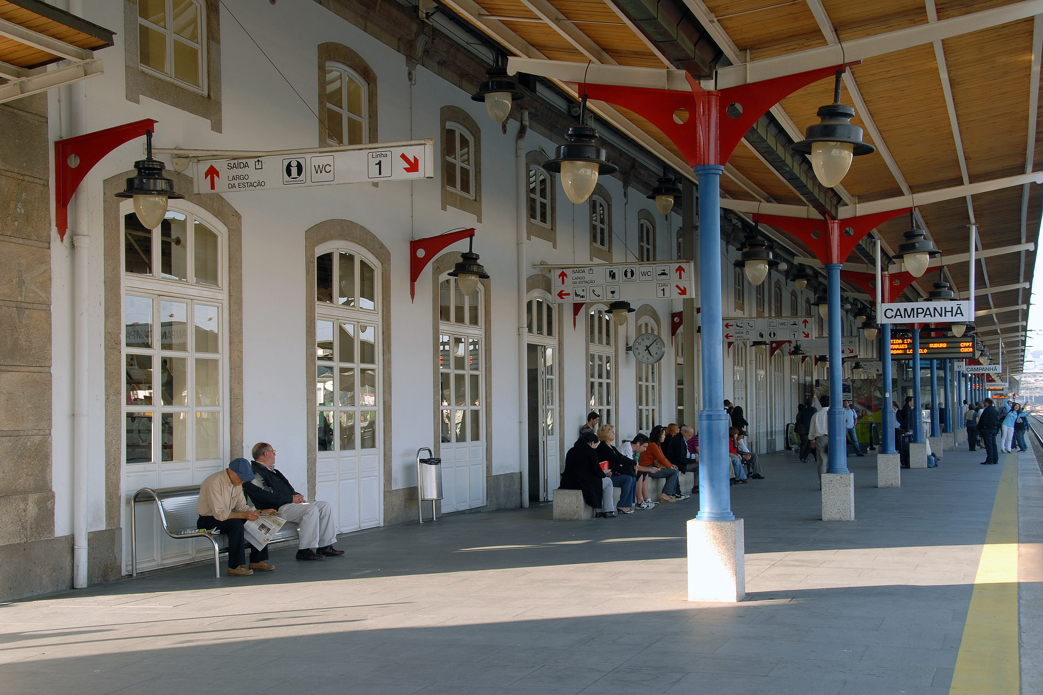 Campanhã-Estação Ferroviária de Campanhã This file was uploaded for Wiki Loves Monuments in Portugal with the unique identifier 97023030.